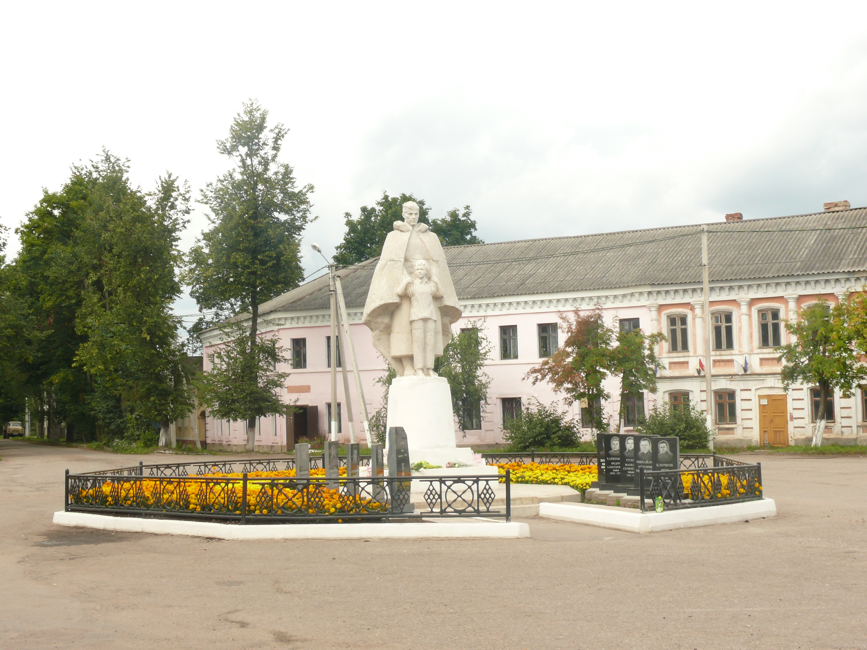 Воинский мемориал в городе Сольцы, Новгородская область